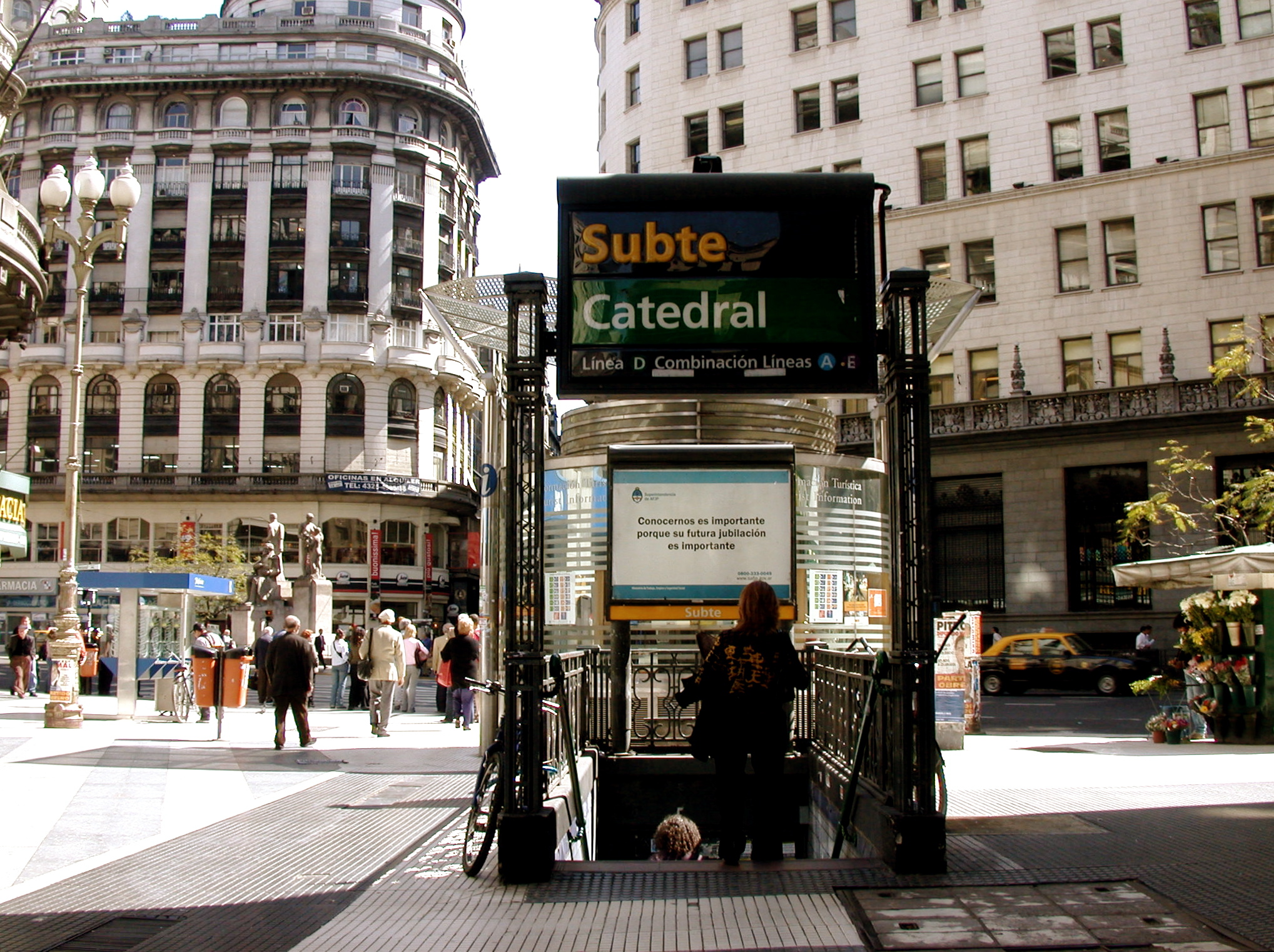 Entrada al la estación Catedral de la Línea D, Florida y Avenida Roque Saenz Peña (Diagonal Norte), Buenos Aires, Argentinabuenos aires, argentina